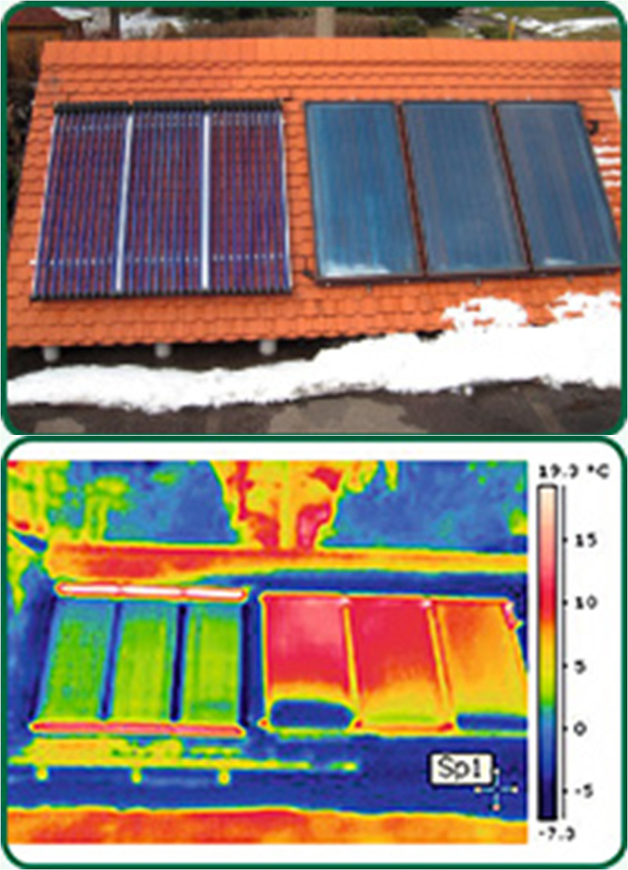 sur l'image thermique on voit que la chaleur (blanc) se concentre uniquement au niveau du collecteur sur le capt tube, et ne se perd pas.